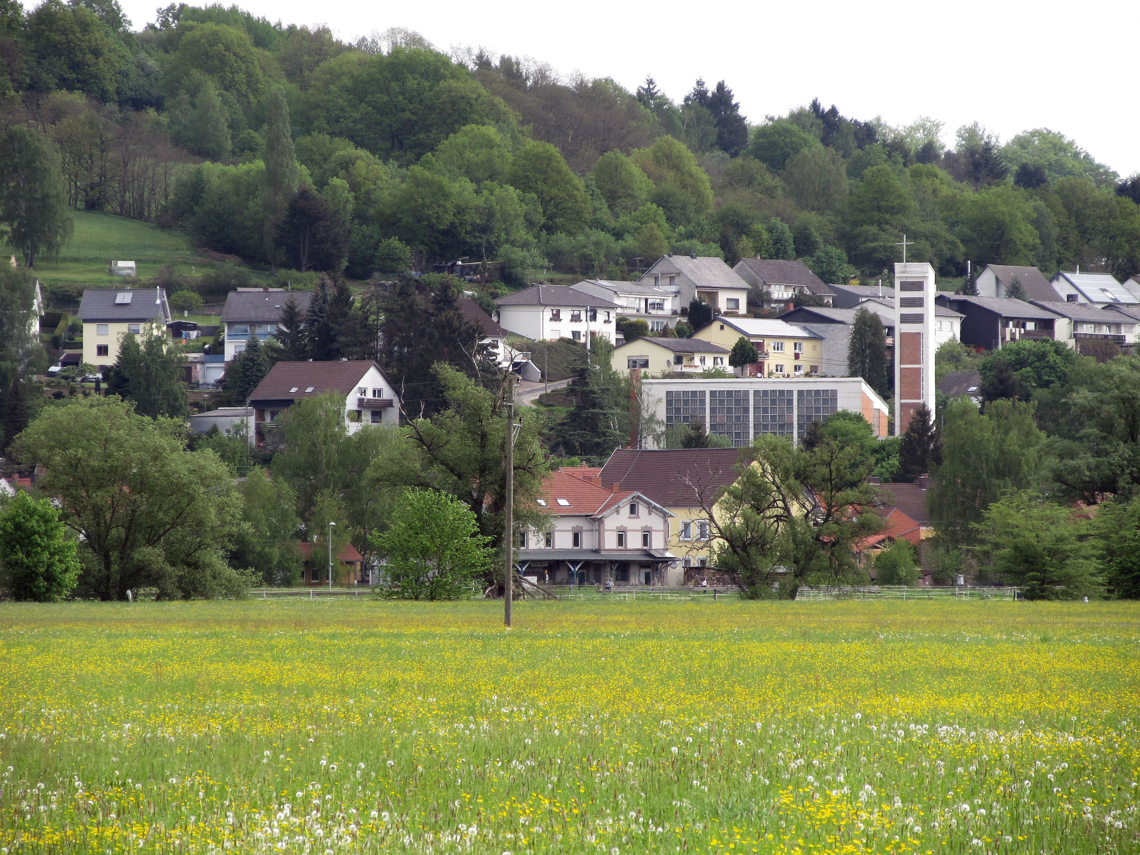 Blick auf Bierbach vom Bliestal aus